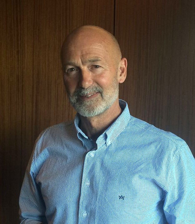 B.S. Christiansen 2014